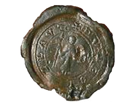 Bulla Krzywoustego odkryta na Ostrowie Tumskim w 2005 (pochodzenie - XII w.). Obecnie przechowywana jest w zbiorach Instytutu Prahistorii UAM w Poznaniu (Polska) .